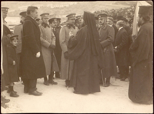 Архимандрит Евлогий Солунски посреща престолонаследника Борис ІІІ в Солун.